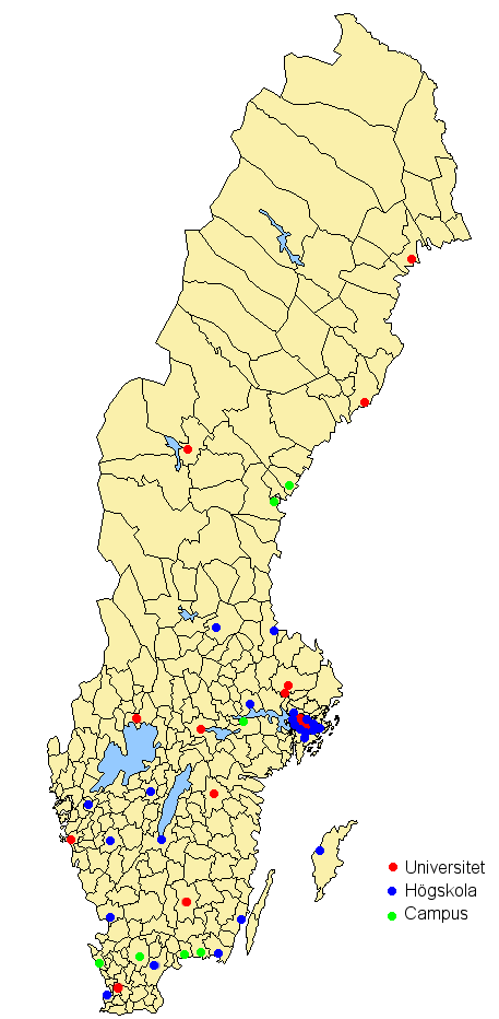 The map shows universities, colleges, and external campuses in Sweden but is incomplete, lacking at least one university (Chalmers tekniska högskola) and several colleges (Gammelkroppa skogsskola, Johannelunds teologiska högskola, Örebro teologiska högskola och eventuellt Center för Cognitiv psykoterapi och utbildning).